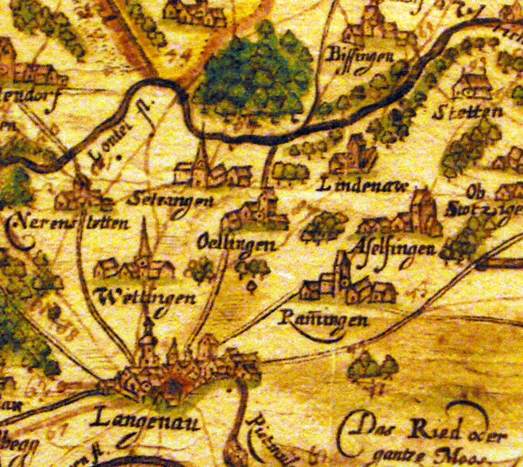 Ausschnitt aus einer historischen Karte von Wolfgang Bachmeyer. Das Original der Karte ist im Stadtarchiv Ulm. Der Ausschnitt wurde im Heimatmuseum Langenau aufgenommen, wo sich eine Kopie des Originals befindet.